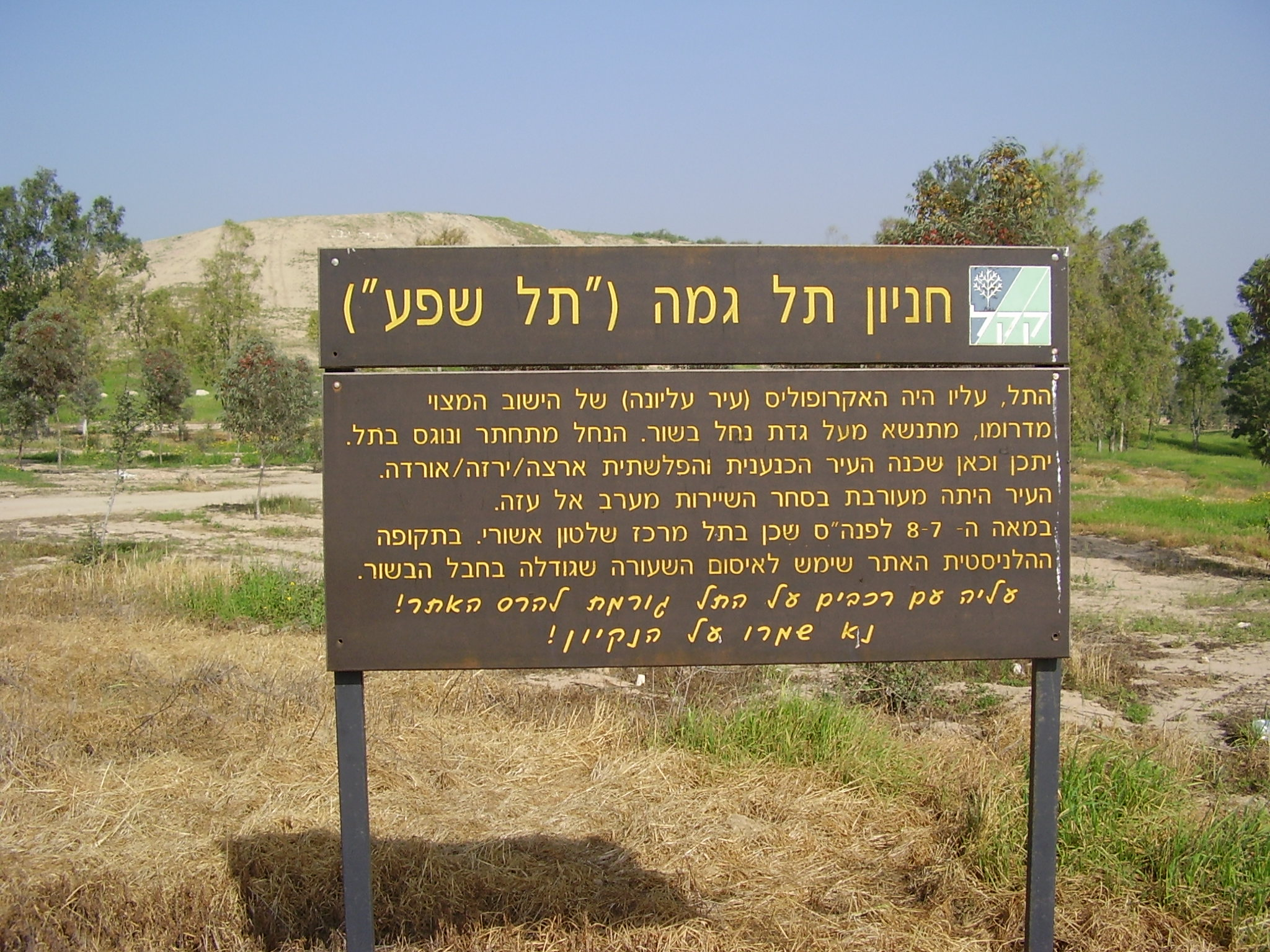 שלט הסבר של קק"ל בתל גמה בנגב